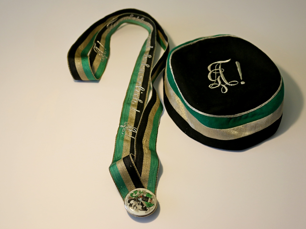 Couleur (Band und Tönnchen) der Alsatia Leipzig im Burschenbunds-Convent